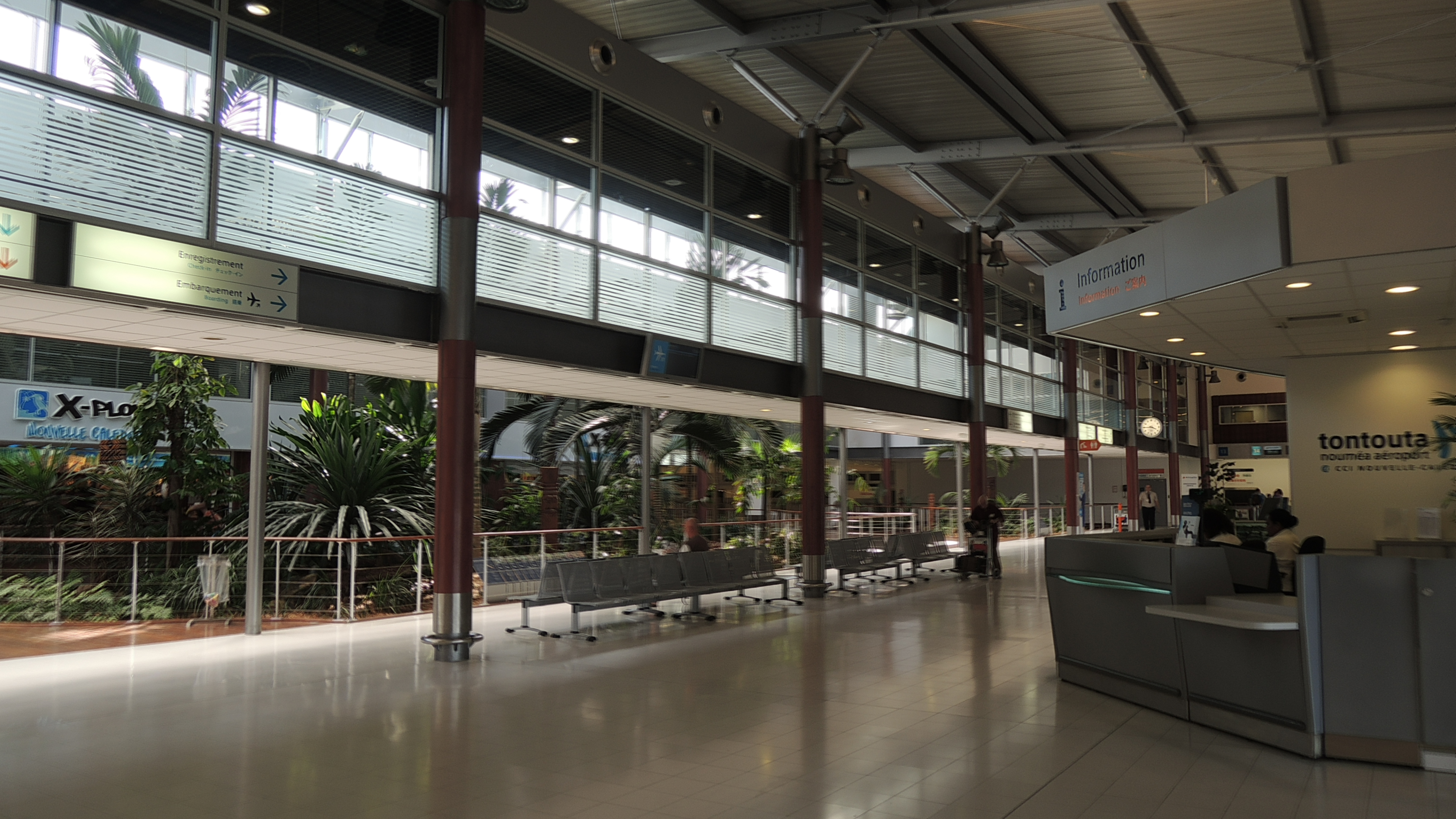 Hall principal de l'aéroport